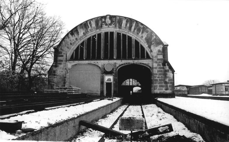 ADN-Karl-Heinz Schindler 26.12.90 Potsdam: Bahnhof - Winterschlaf für den ehemaligen "Kaiserbahnhof" in Wildpark-West. Es scheint sich nun tatsächlich ein Licht am Ende des Tunnels abzuzeichnen, denn ab 1991 soll dem fortschreitendem Verfall des historischen Bauwerks mit umfassenden Rekonstruktionsarbeiten begegnet werden. Ehrgeizige Projekte sehen darüberhinaus vor, bis zum Jahre 1993 das Umfeld der Anlage mit Hotels und Freizeiteinrichtungen zu bebauen.